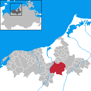 Dummerstorf in Mecklenburg-Western Pomerania - District Bad Doberan